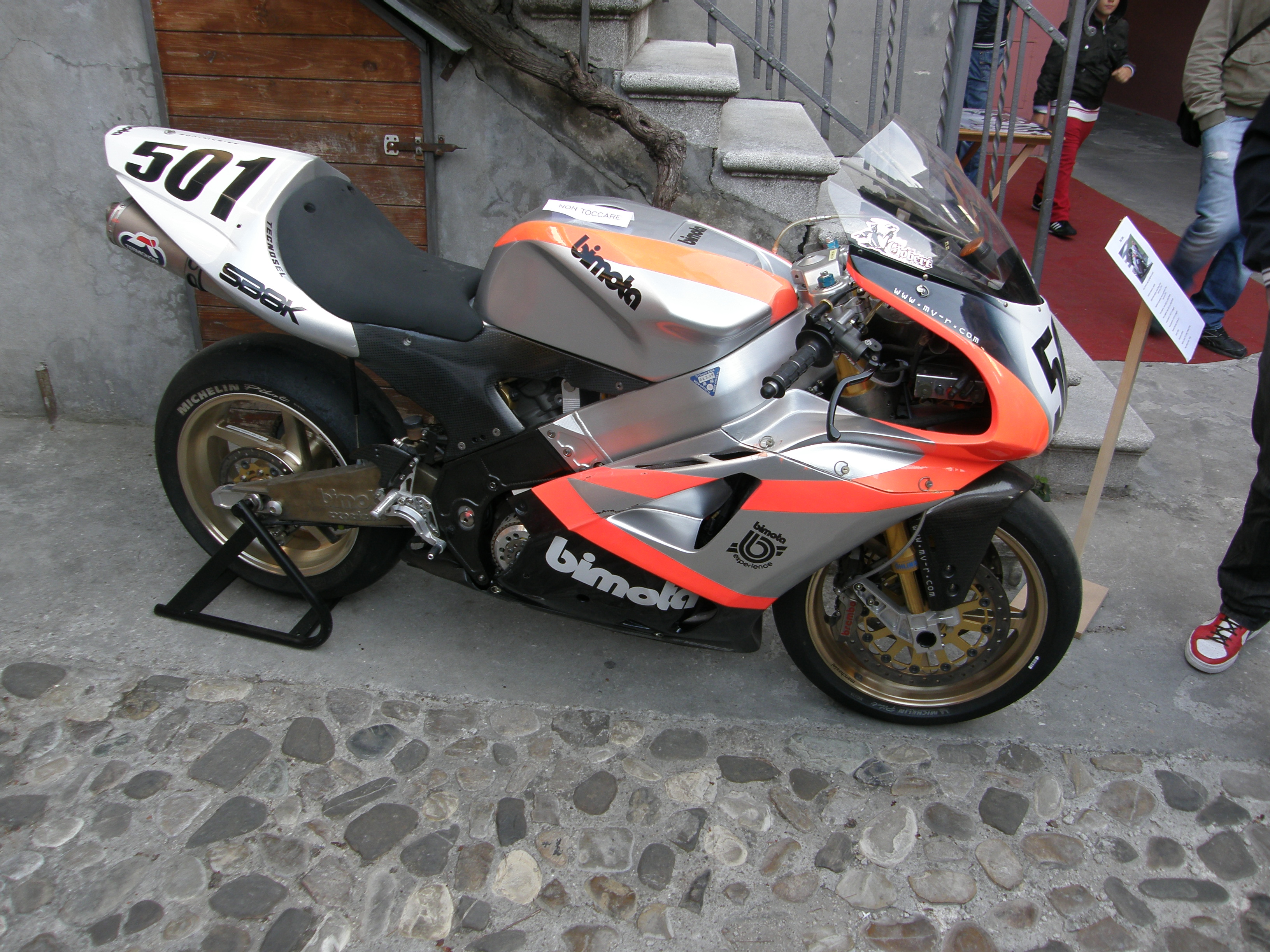 Bimota SB8K di Anthony Gobert - vista laterale